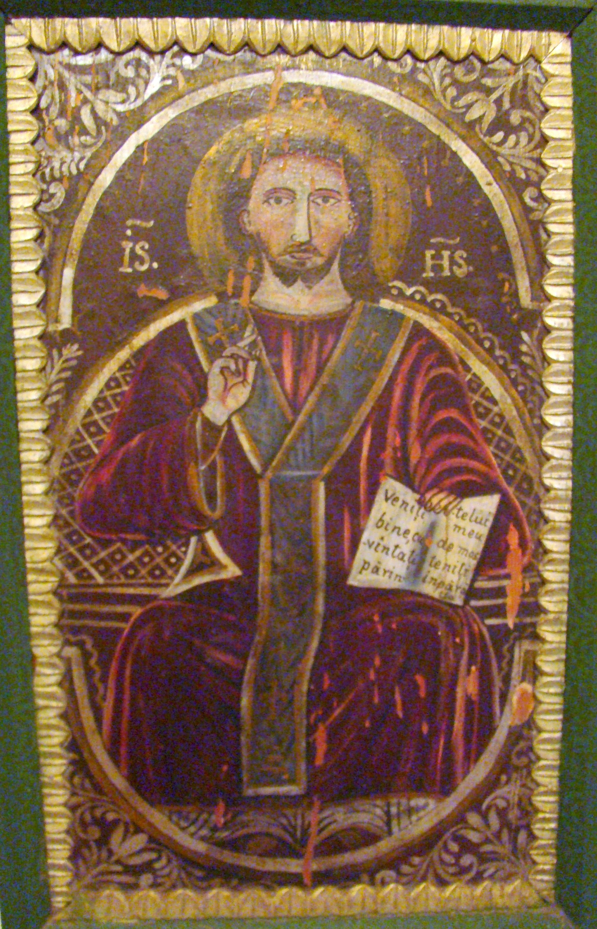 Biserica de lemn „Adormirea Maicii Domnului”,sat STĂNIJA; comuna BUCEŞ